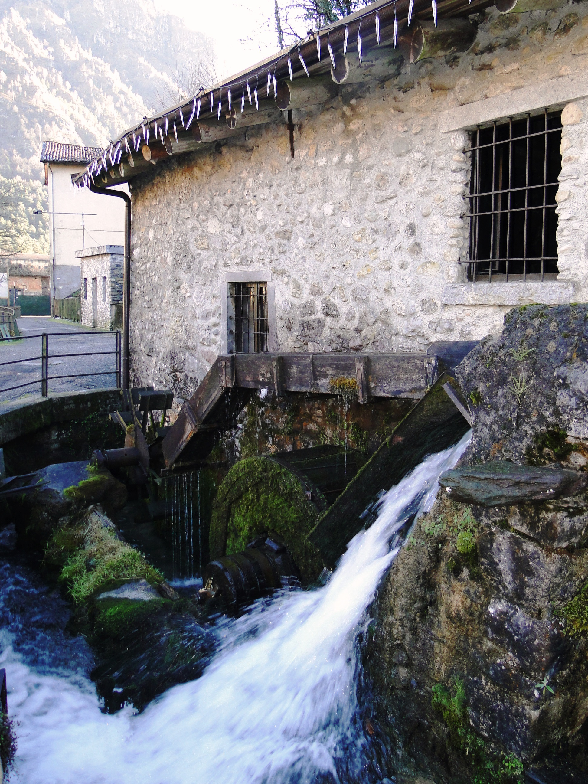 Museo maglio di Ponte Nossa (BG)